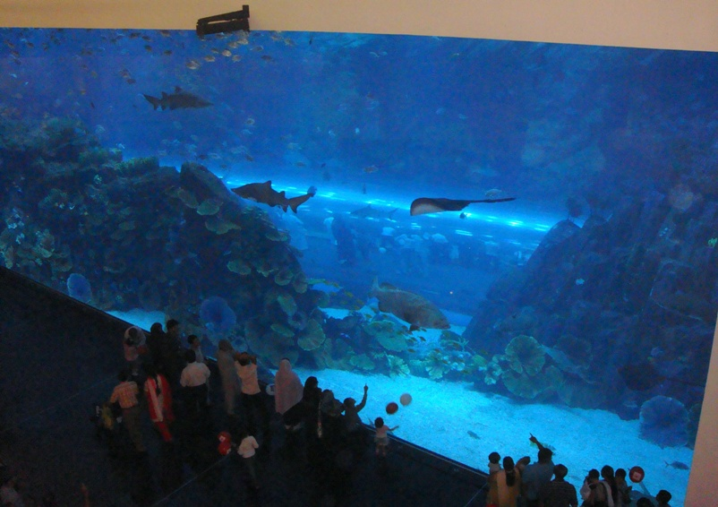 Вид на аквариум в торгово-развлекательном центре «Дубай» в Дубае